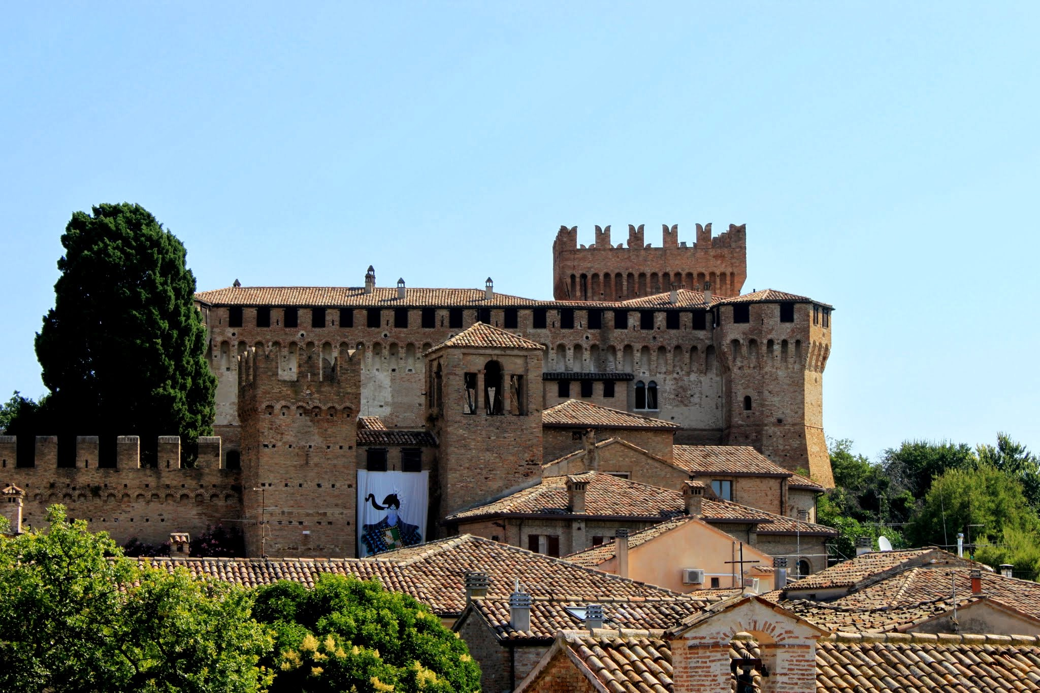 Gradara castle